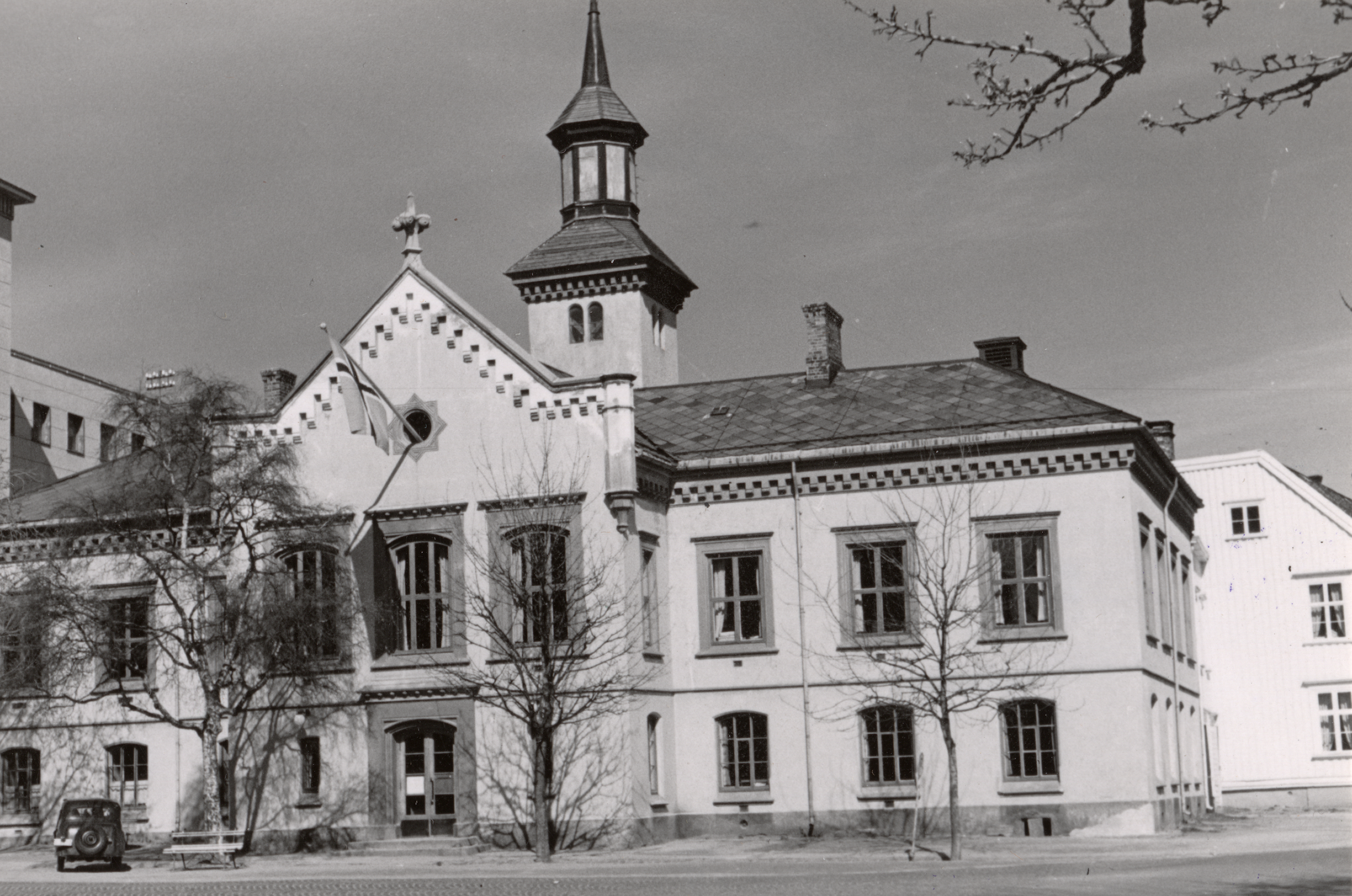 Det gamle Rådhus - Trondheim Folkebibliotek i Trondheim, Sør-Trøndelag